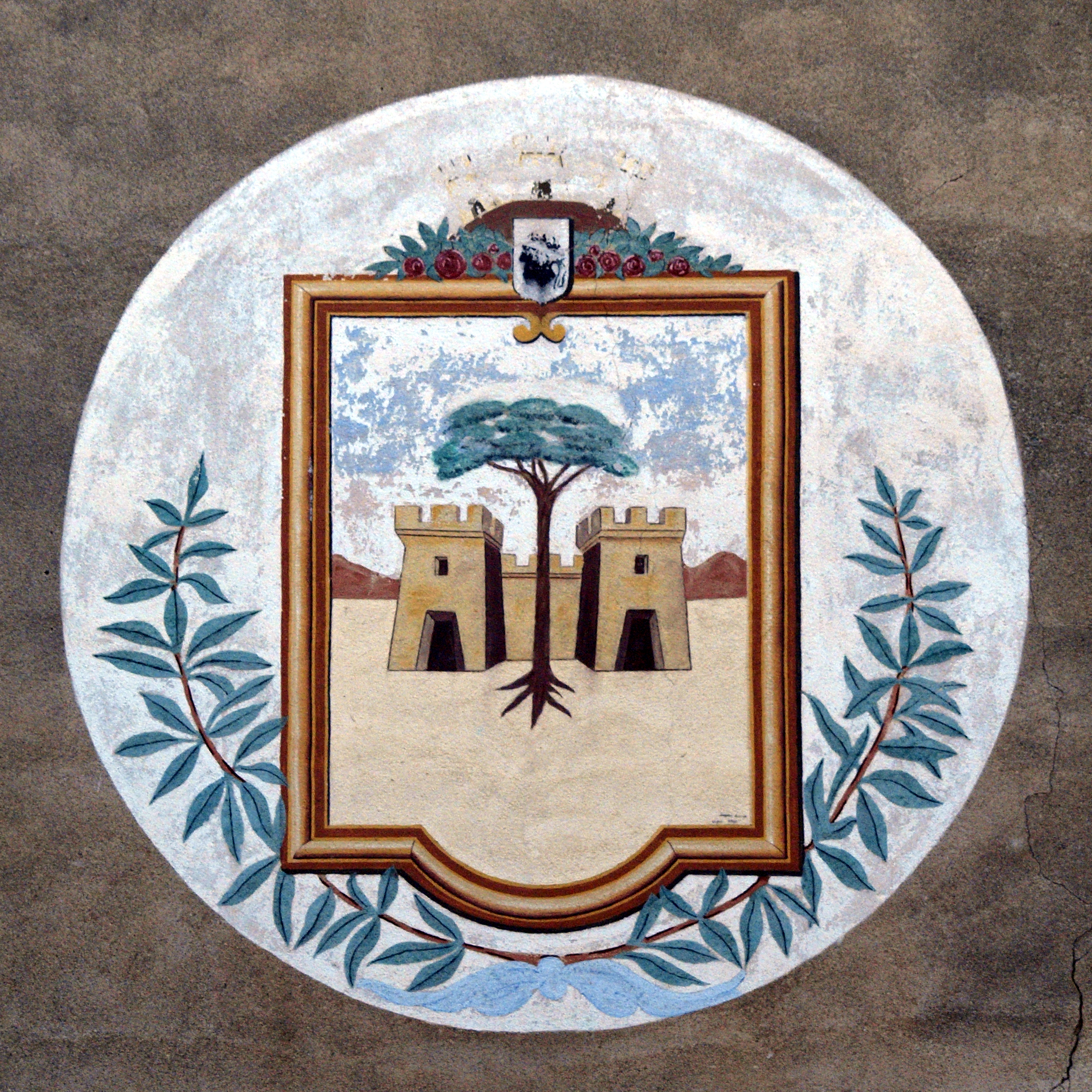 Saint-Florent (Haute-Corse) - Blason de la ville peint sur un mur dans les années 1930 par Antoine -Joseph Baffico, pour le compte d'une entreprise bastiaise.